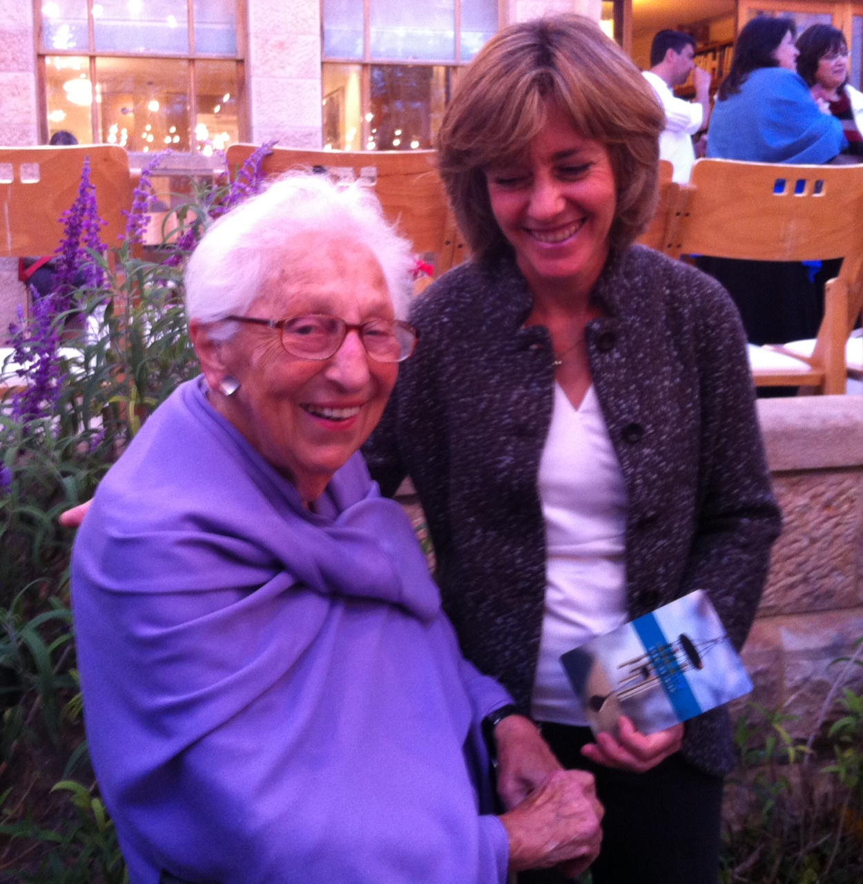 אליס שלוי ובברלי ברקת, ירושלים 2013